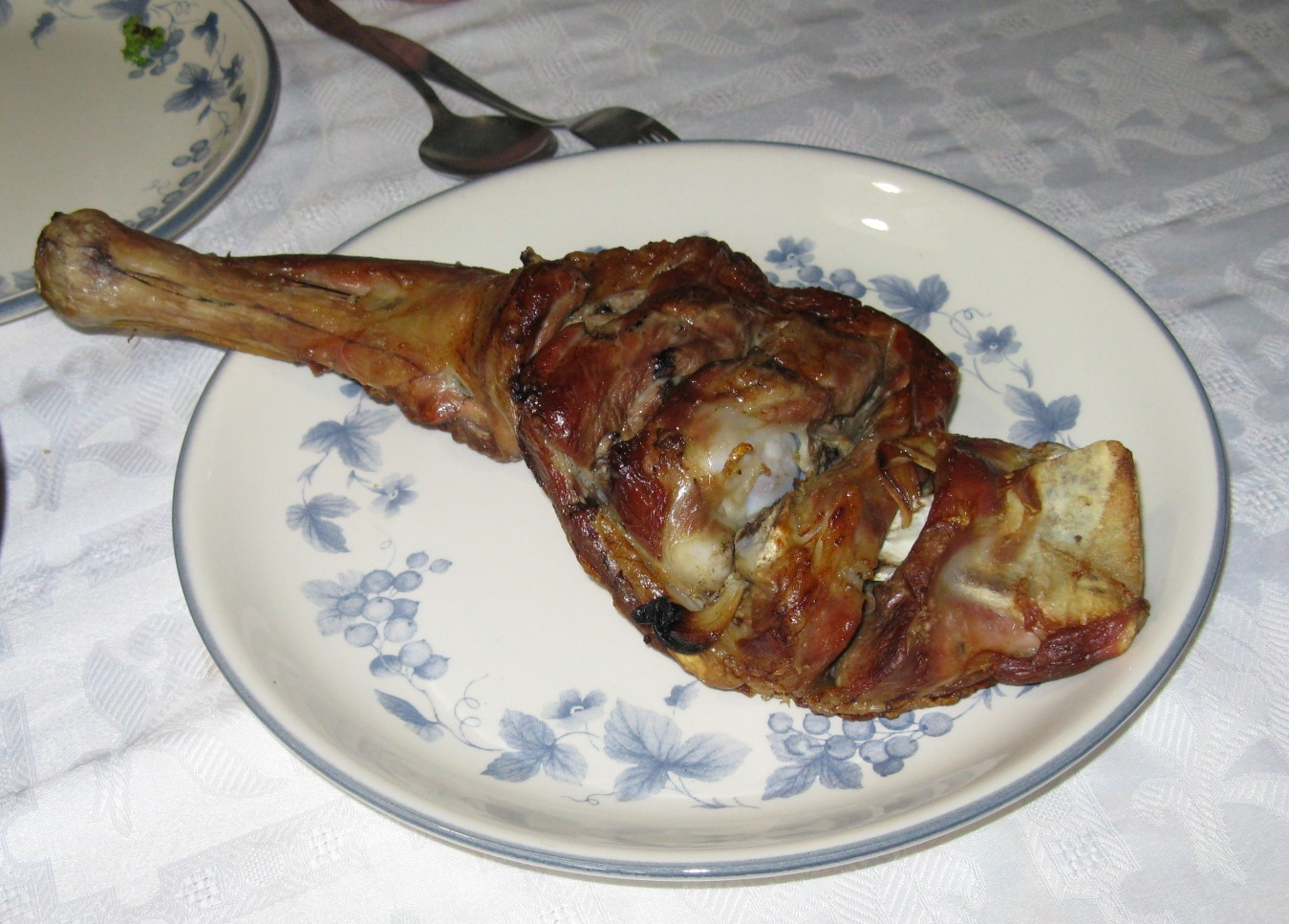 Lammkeule gegrillt